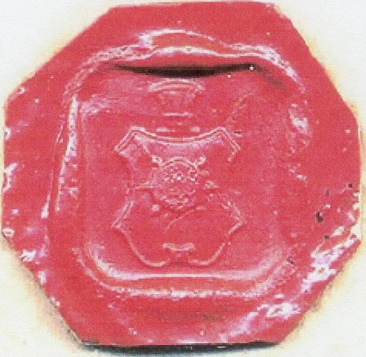 Sceau Goldie (Ecosse).